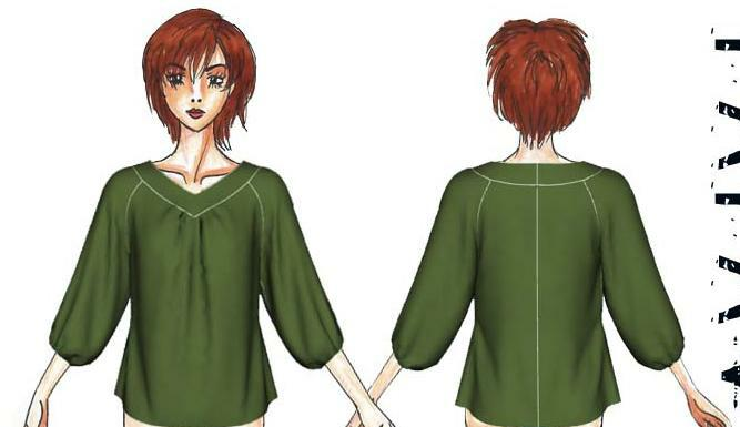 पाली pālī: Raglan - typ rękawa.